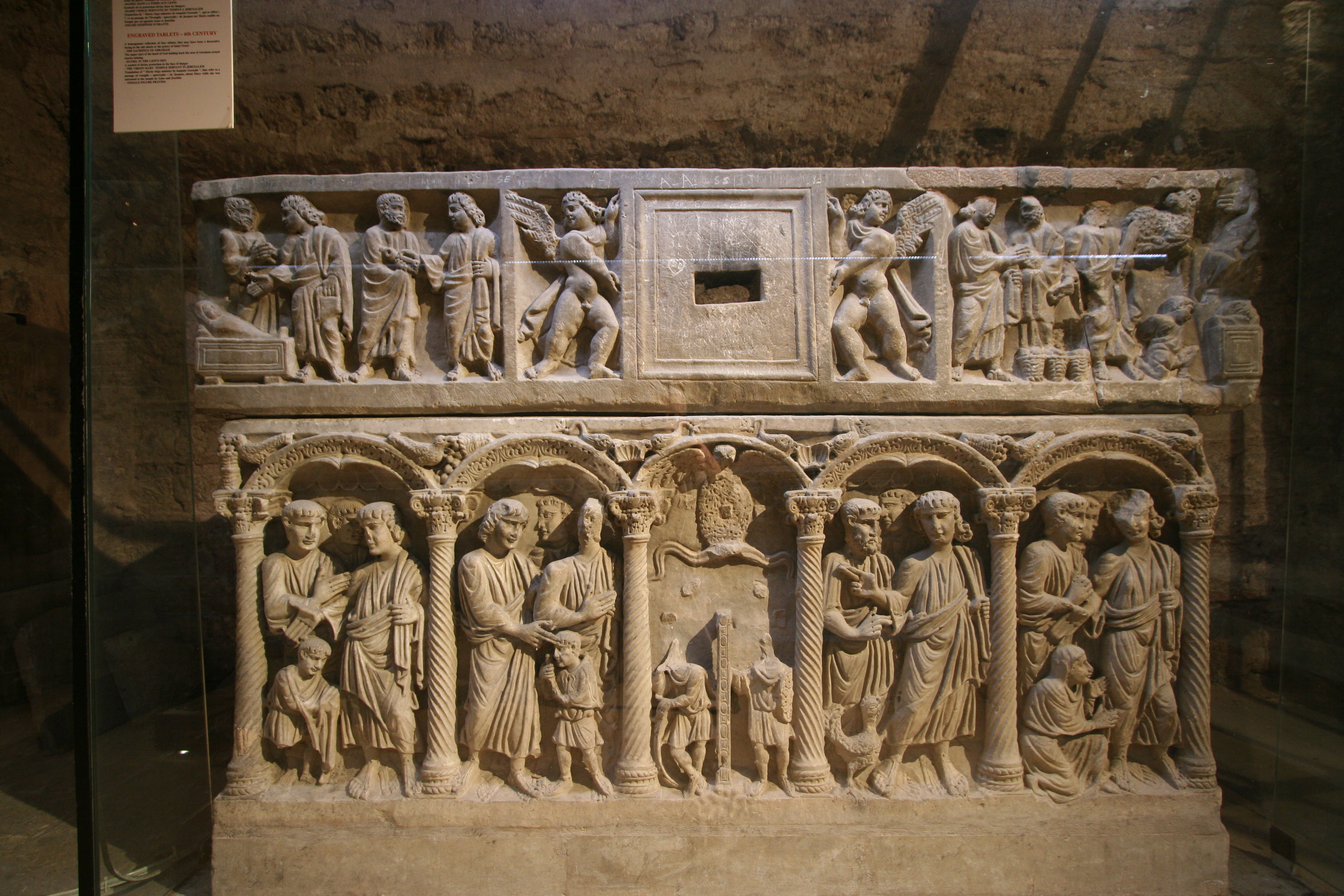 Basilique de Saint-Maximin (département du Var). Sarcophage paléochrétien dit de " Saint Sidoine" (fin IV°-début V° siècle] se trouvant dans la crypte de l'église.